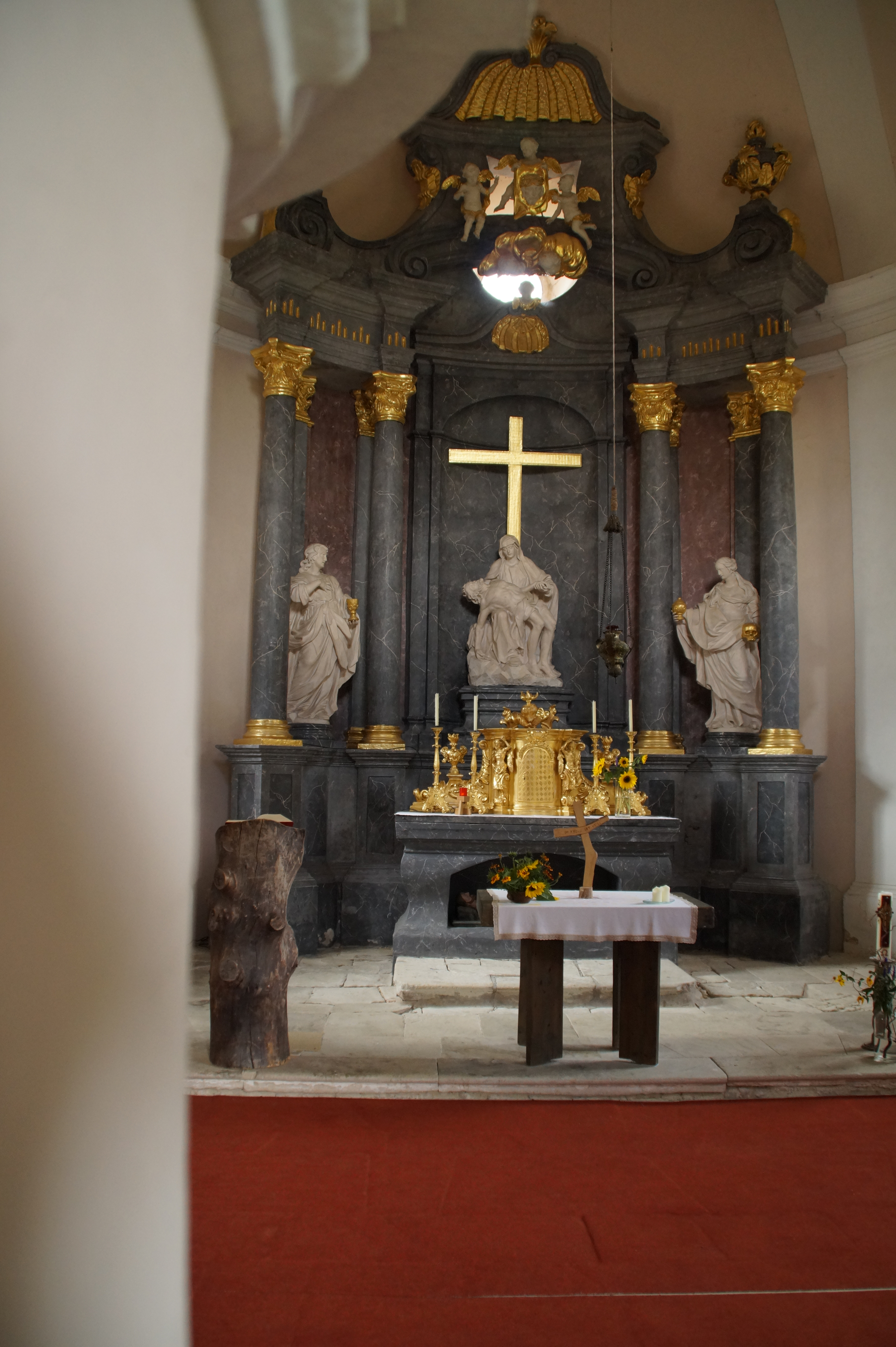 Kalvarienbergkirche Innenraum, Altar mit Steinfiguren von Matthias Steinl, Pinkafeld